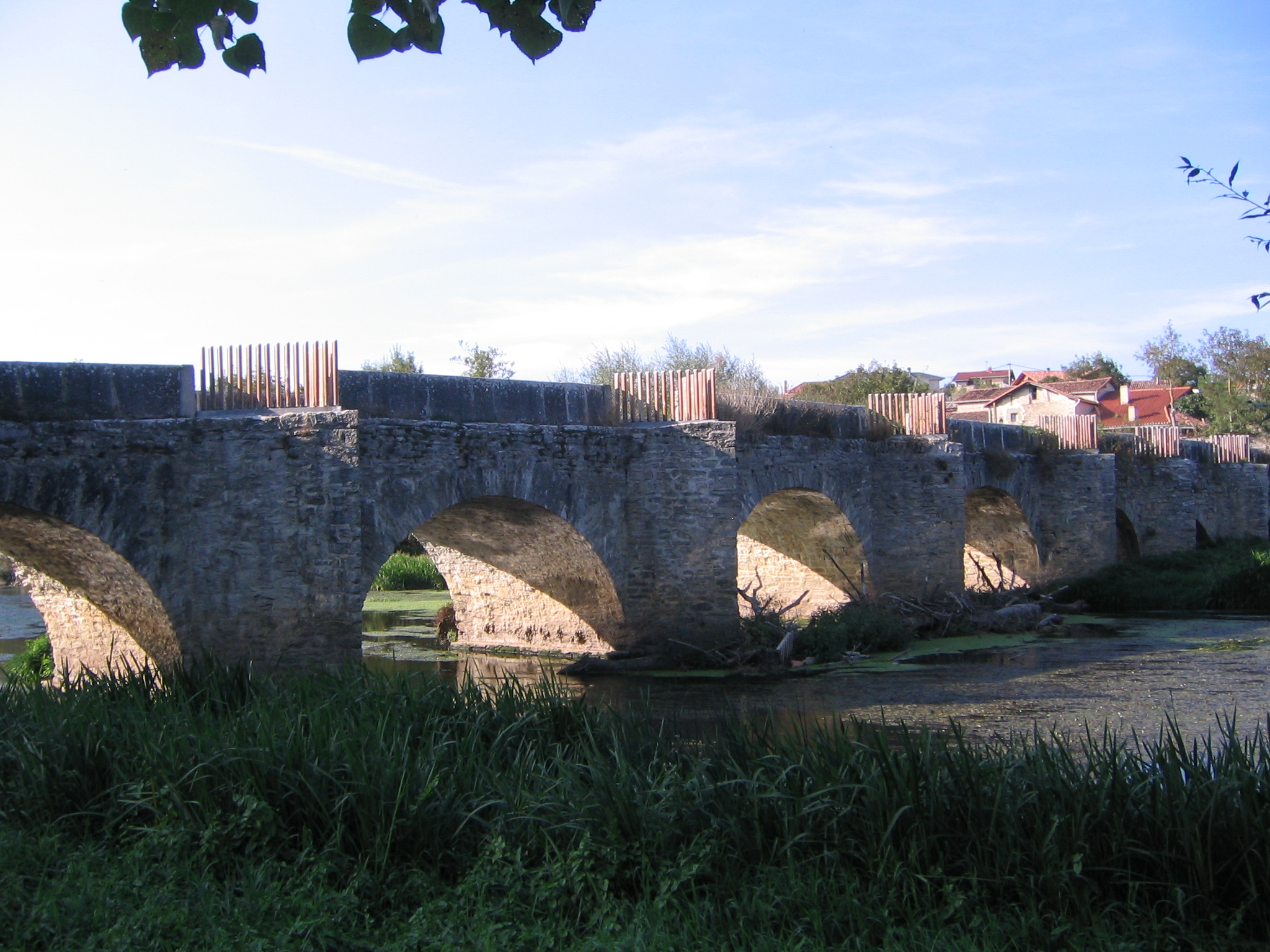 Iruña Veleia, Puente romano de trespuentes. Álava País Vasco (España)